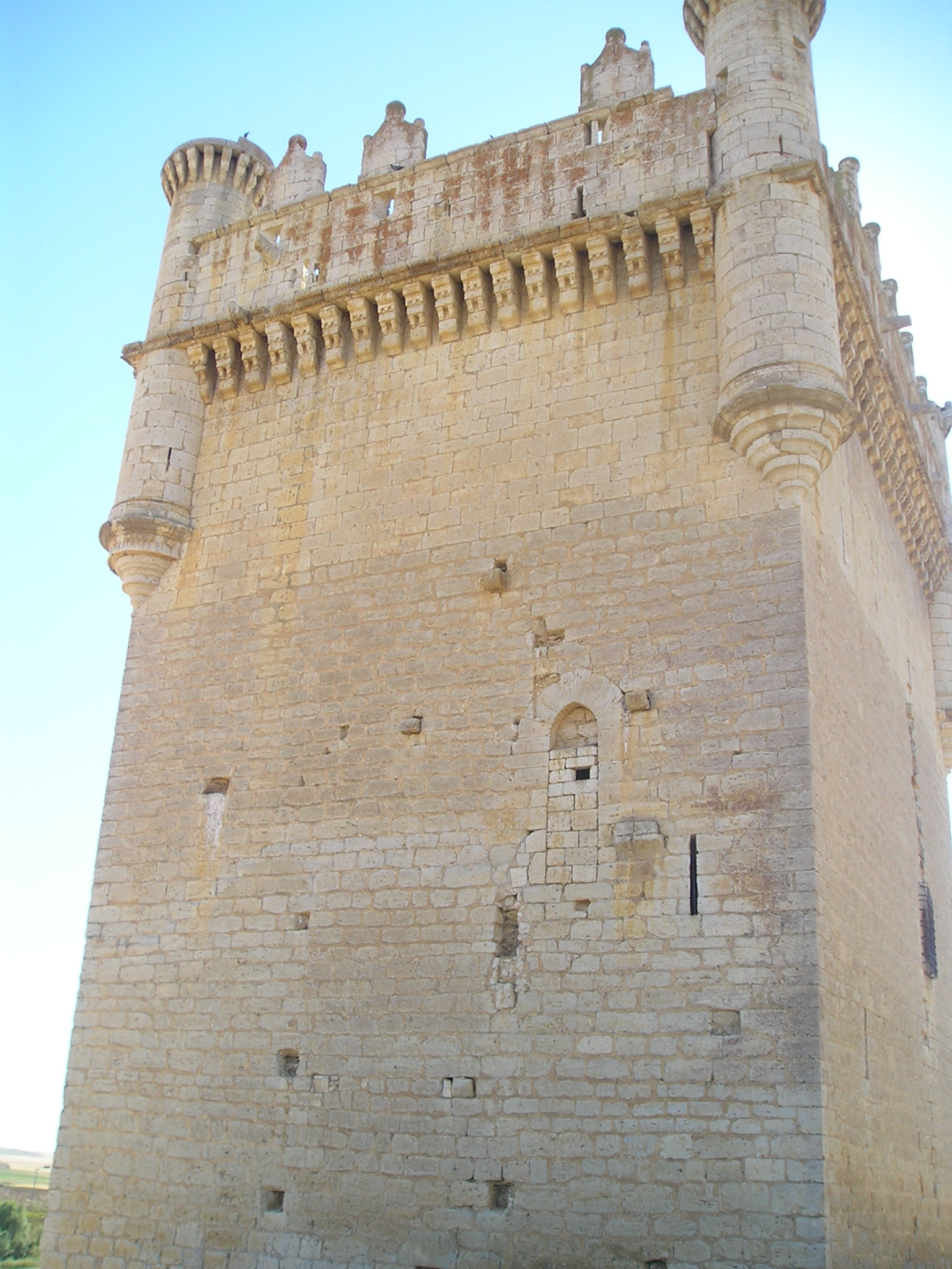 Torre del Homenaje del Castillo de Belmonte de Campos (Palencia, España)